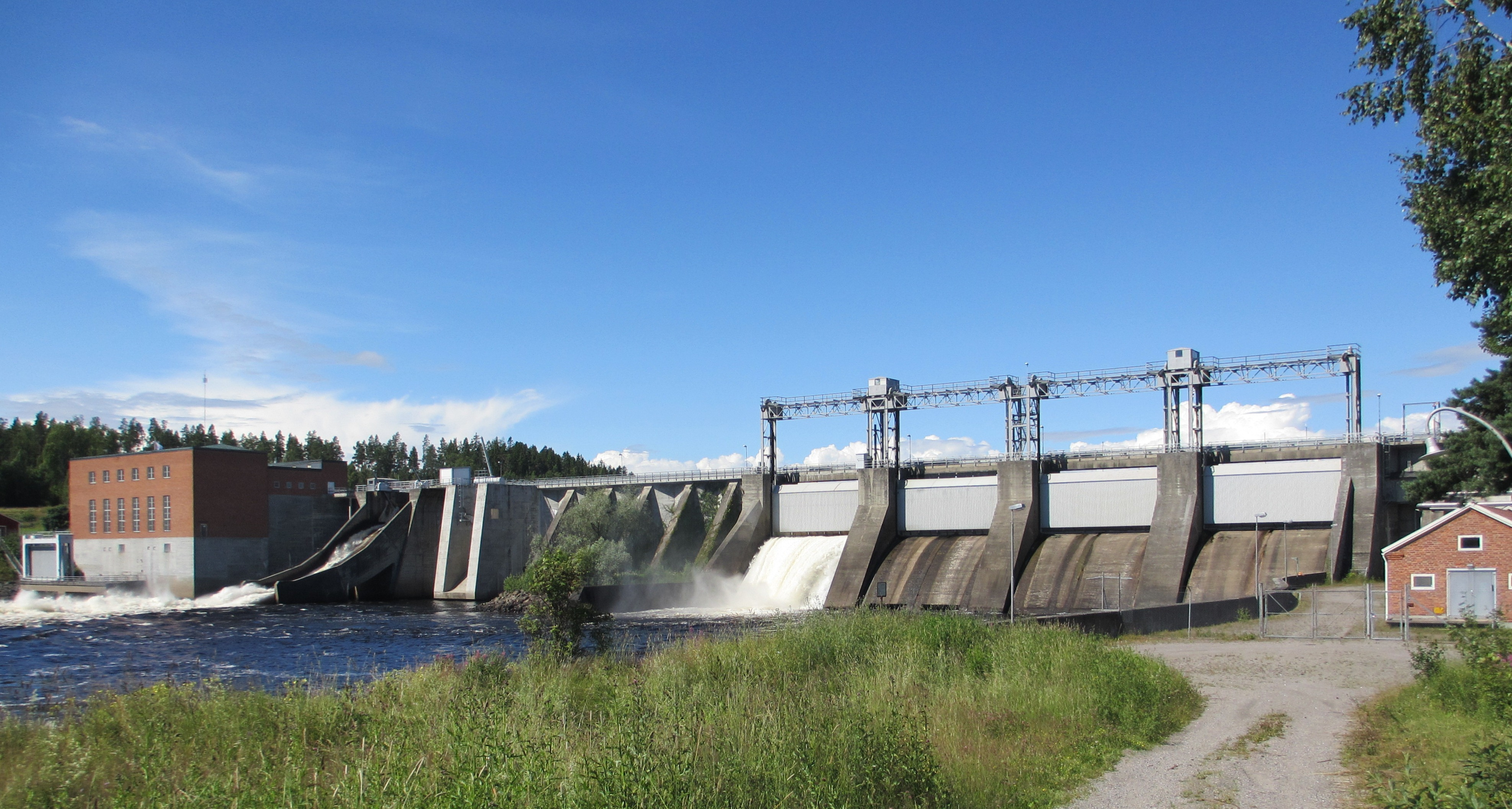 Vattenkraftverk vid Ljusne tillhörande Fortum